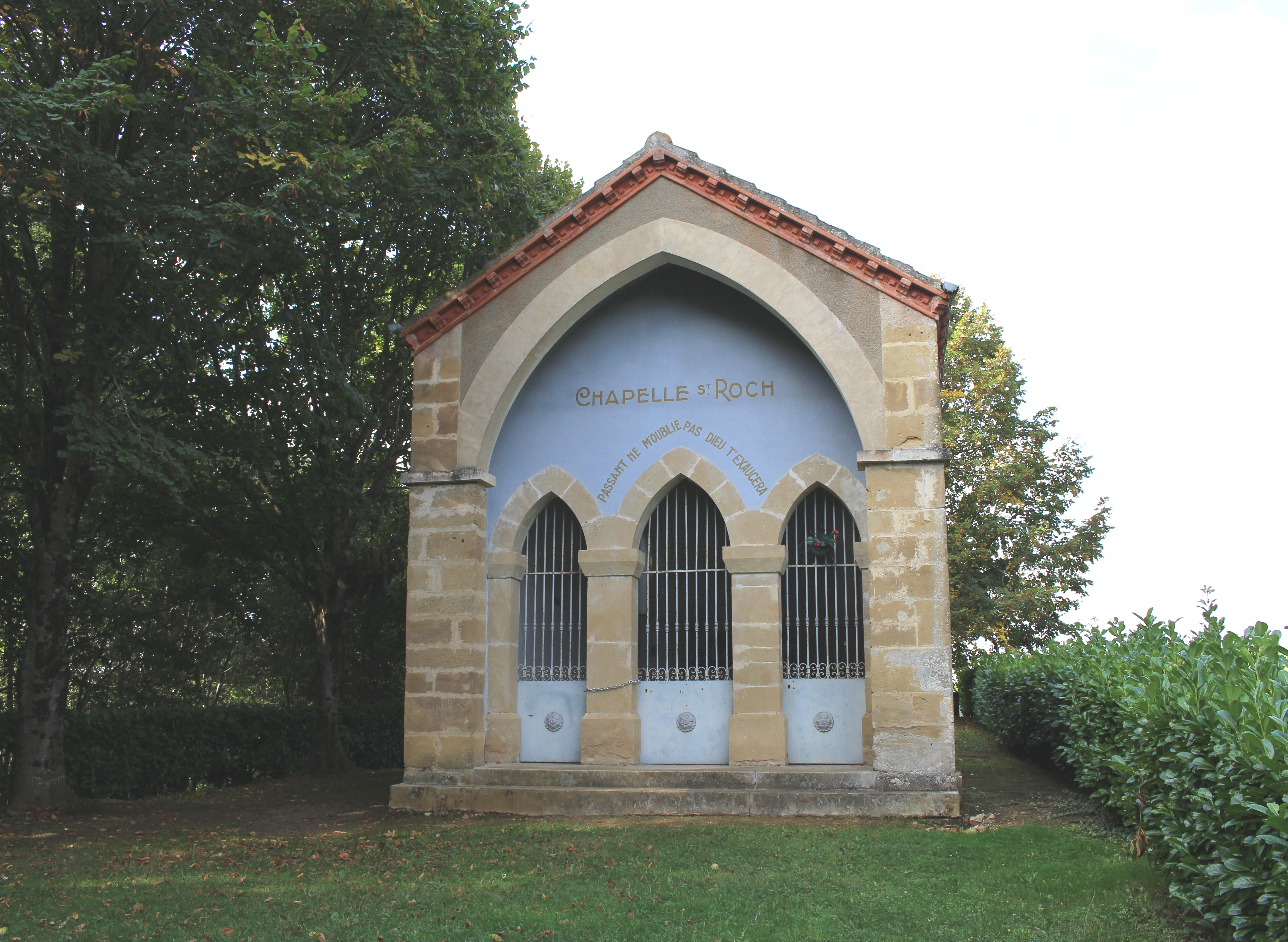 Chapelle Saint-Roch de de Thermes-Magnoac (Hautes-Pyrénées)